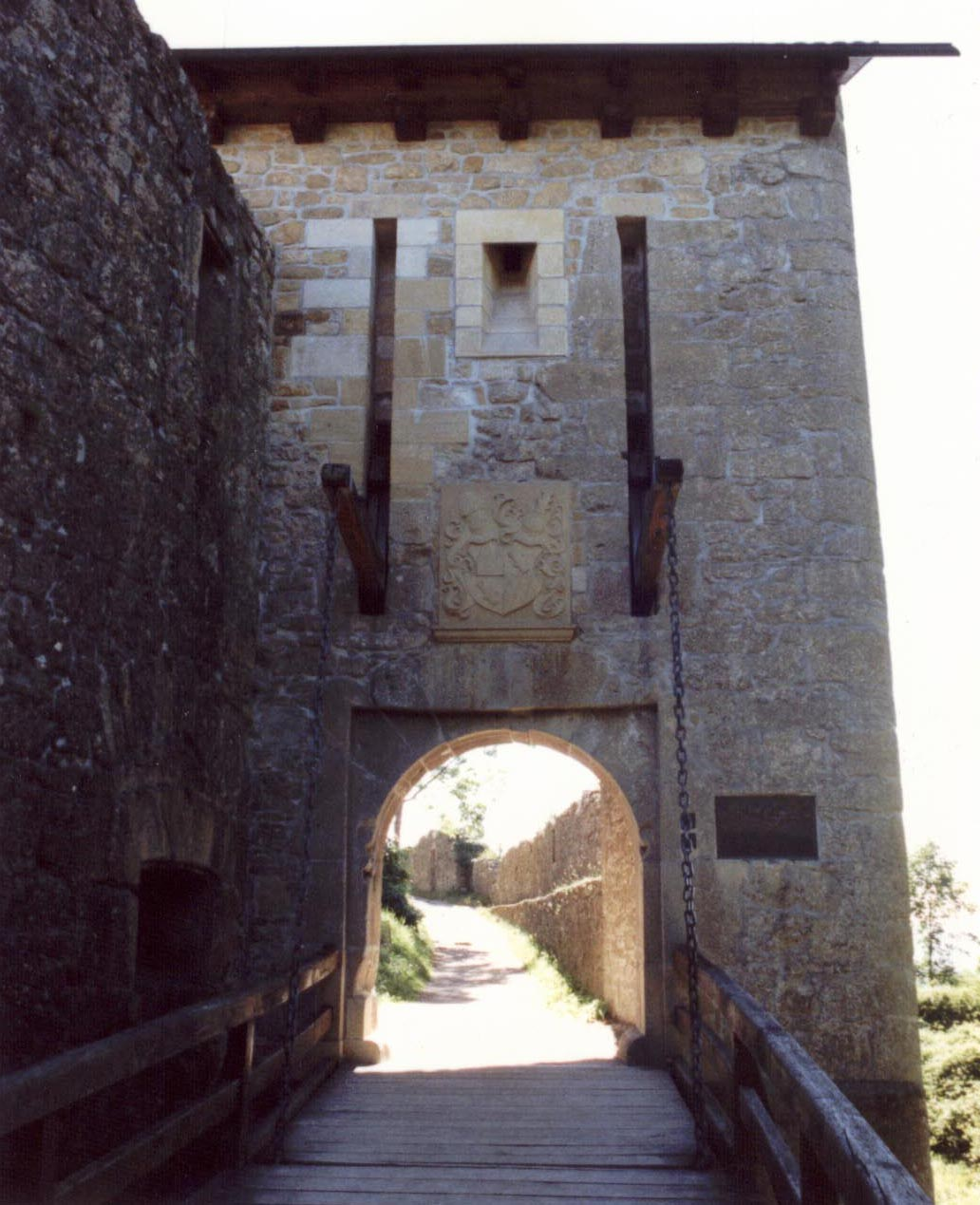 Küssaburg, äußeres Tor mit Zugbrücke